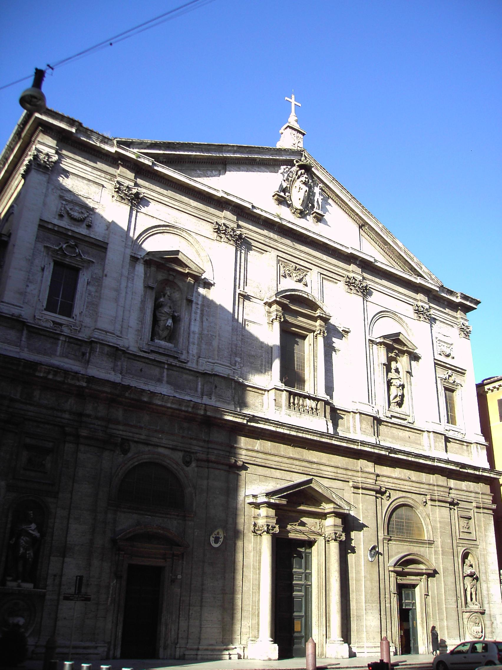 Roma, san Luigi dei Francesi